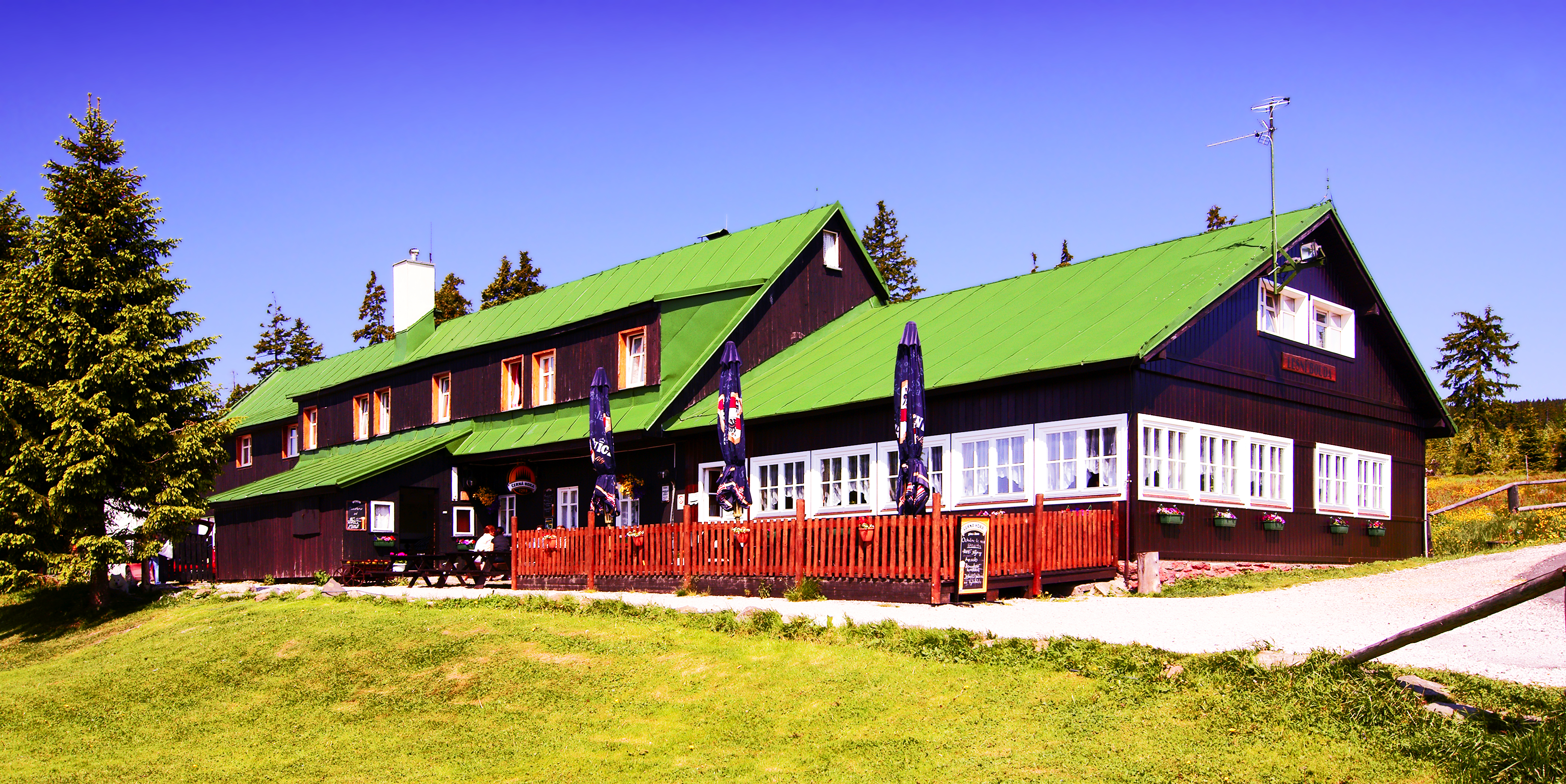 Lesní bouda na hřebeni Liščí hory v Krkonoších.